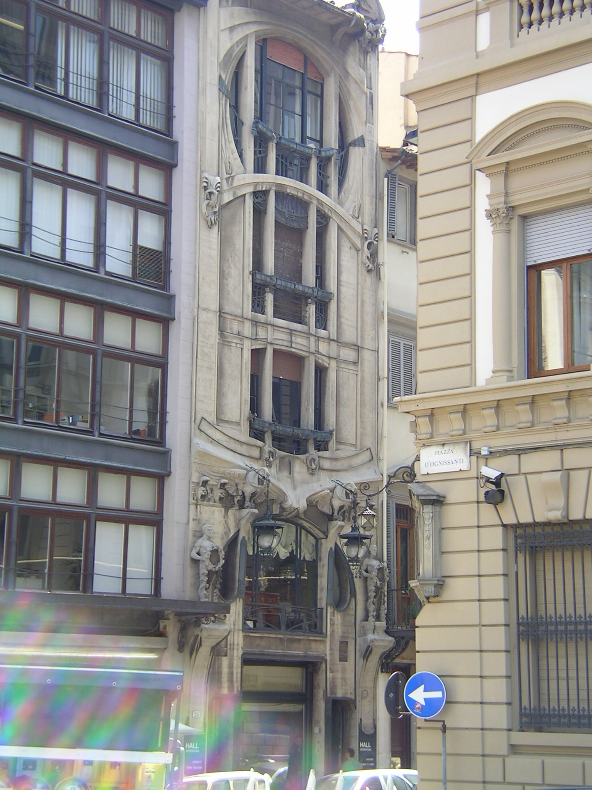 Casa Galleria Vichi, Art Nouveau palace in Via Borgo Ognissanti, front view in Florence, Italy